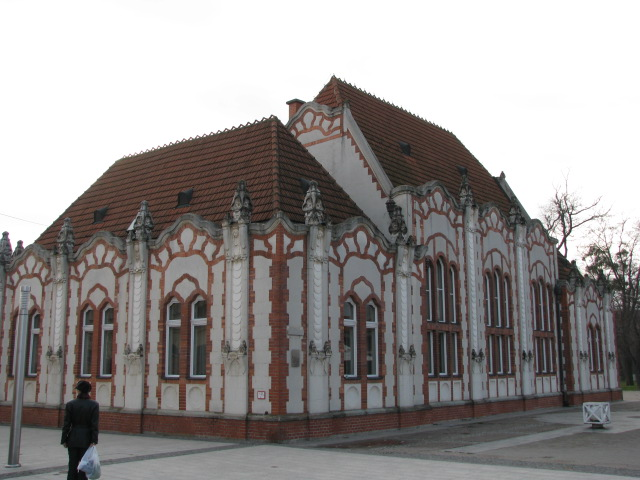 Čakovec - zgrada Trgovačkog kasina